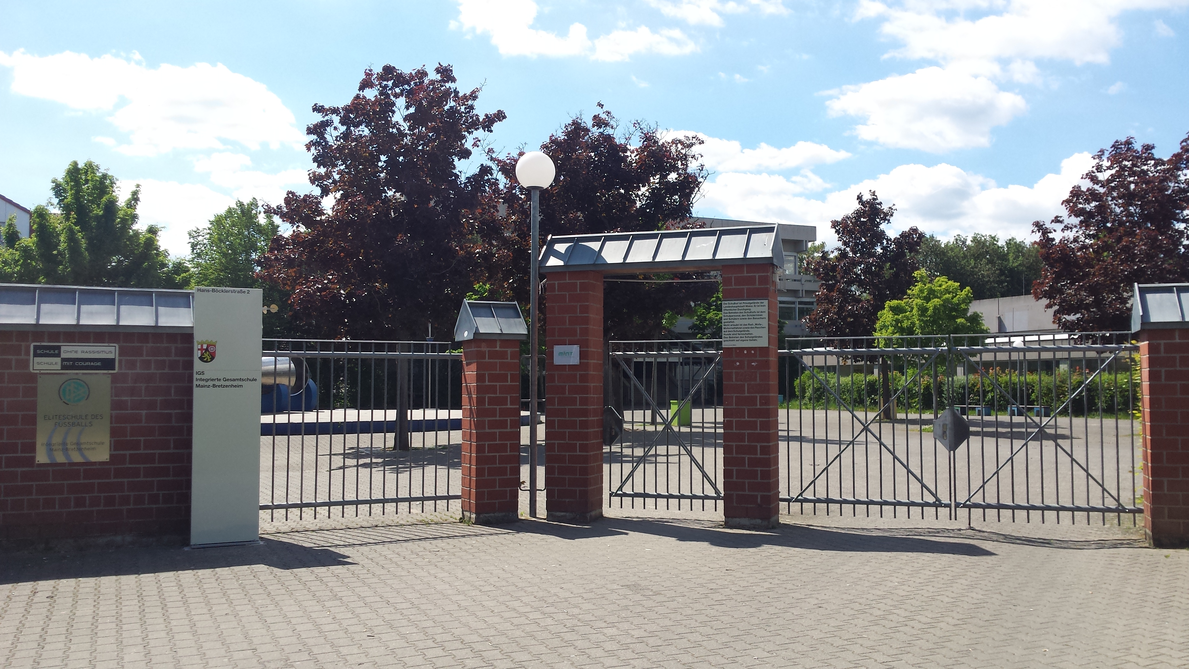 Eingang zur IGS